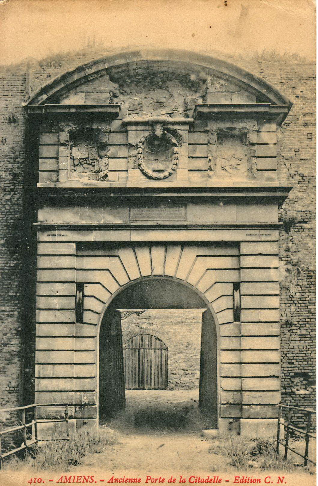 Carte postale ancienne éditée par CN n°410 :AMIENS - Ancienne porte de la Citadelle